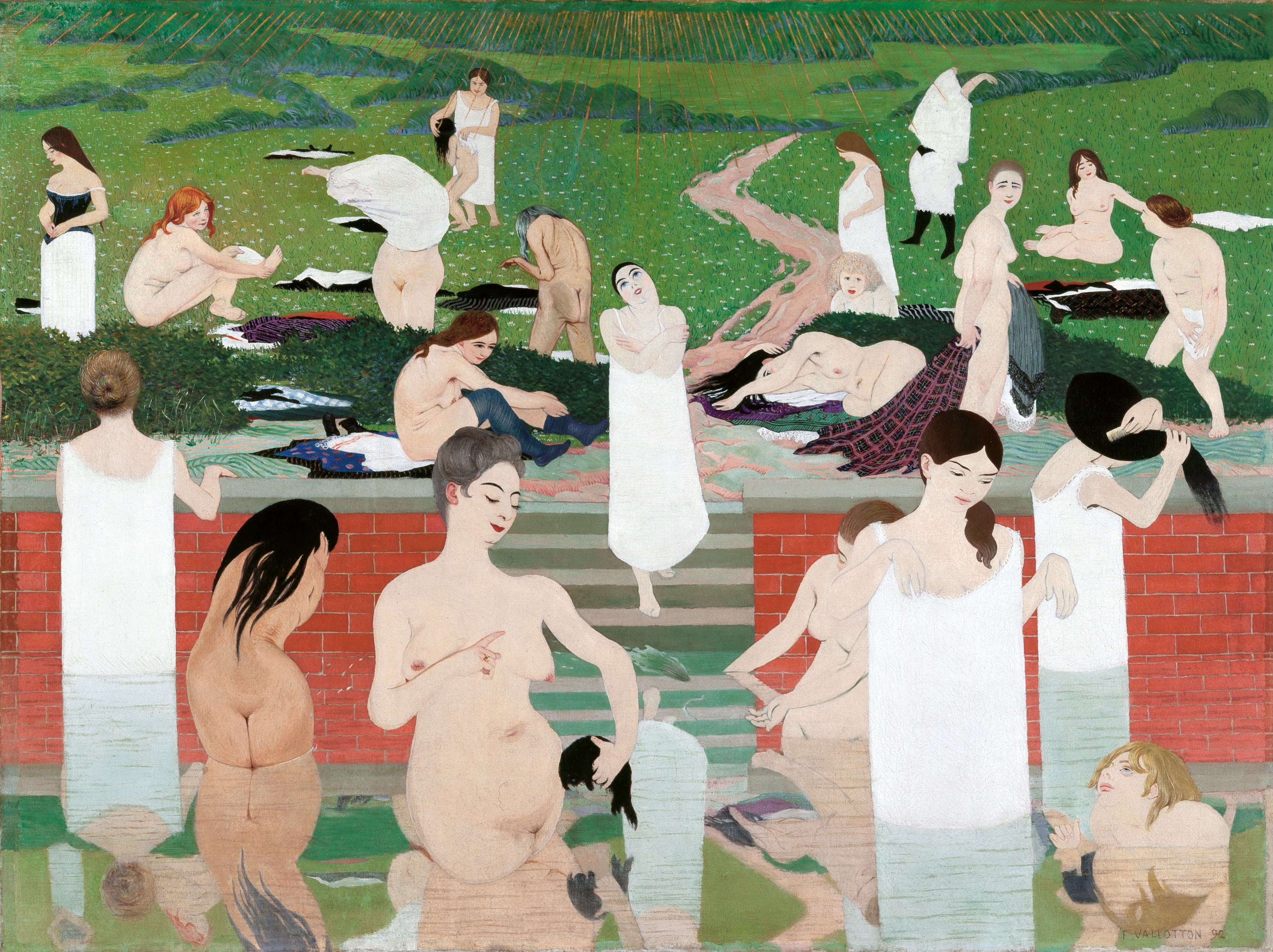 Le Bain au soir d'été (Das Bad, Sommerabend), Gemälde von Félix Vallotton, 1892-1893, oil on canvas 97 x 131 cm, Kunsthaus Zürich, Depositum der Gottfried Keller-Stiftung